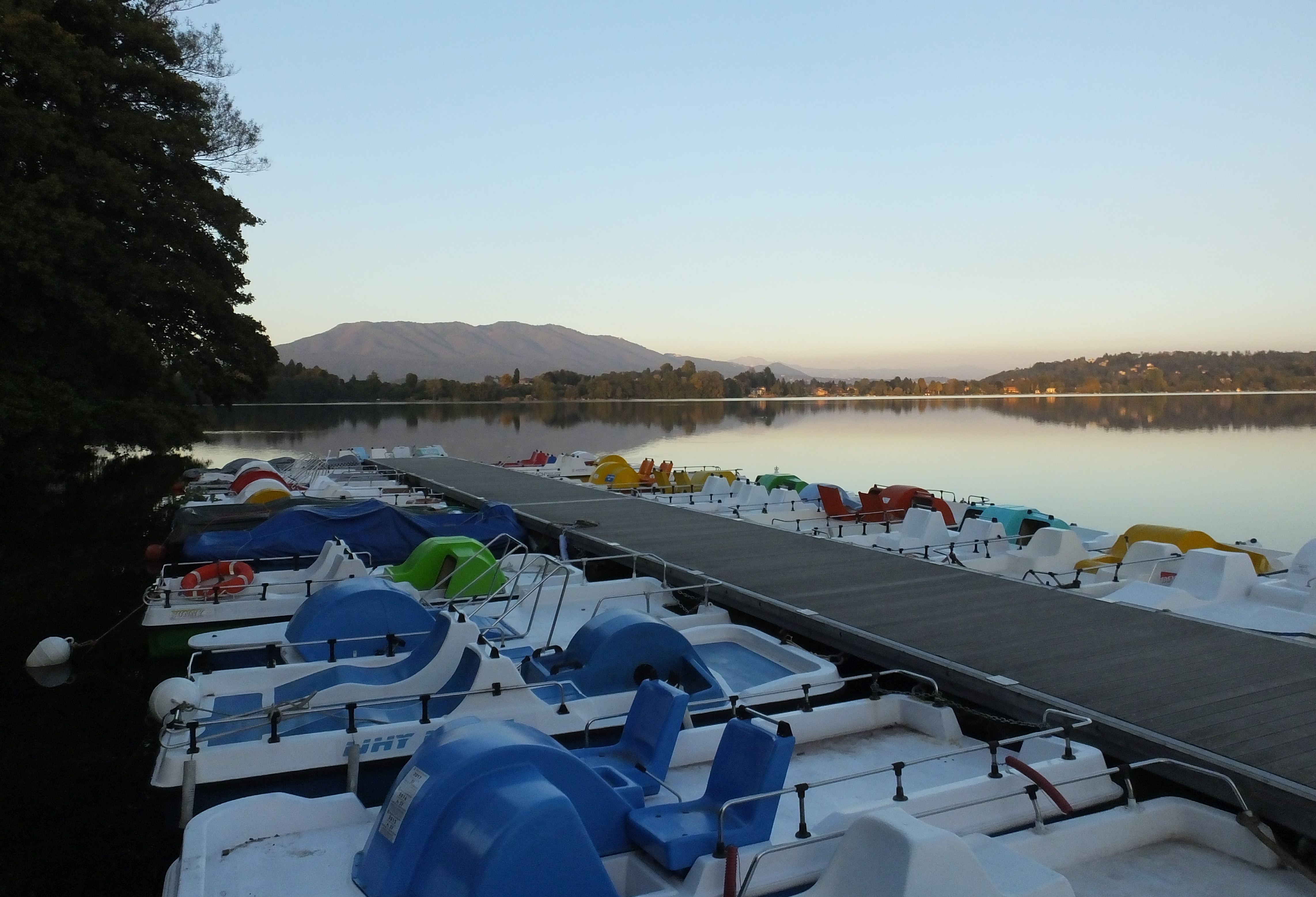 Jezioro Monate w Cadrezzate, przystań rowerów wodnych (Pontile di Attracco Comune di Cadrezzate)